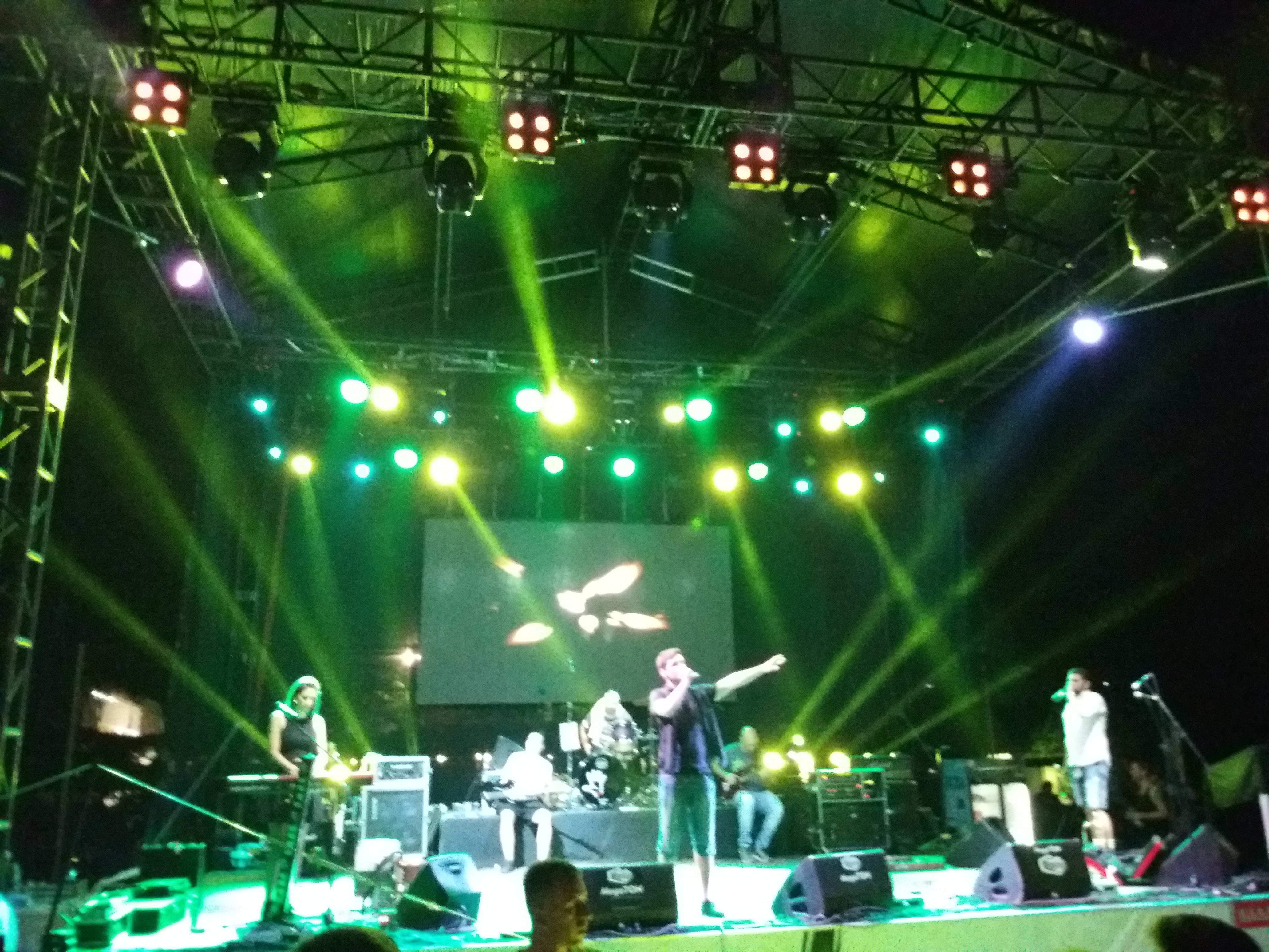 Grupa S.A.R.S. na koncertu u Vladičinom Hanu